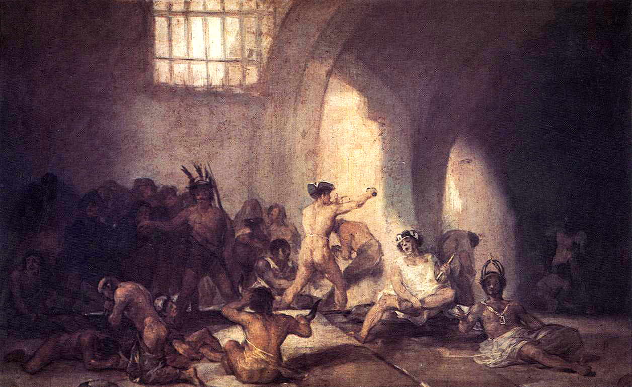 Casa de locos or ManicomioThe Madhousetitle QS:P1476,es:"Casa de locos or Manicomio" label QS:Les,"Casa de locos or Manicomio" label QS:Len,"The Madhouse"